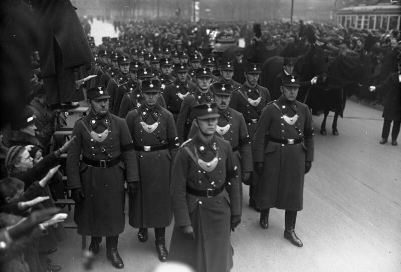 Beisetzung des SS-Gruppenführers Seidel-Dittmarsch in Berlin am 23. Februar 1934.